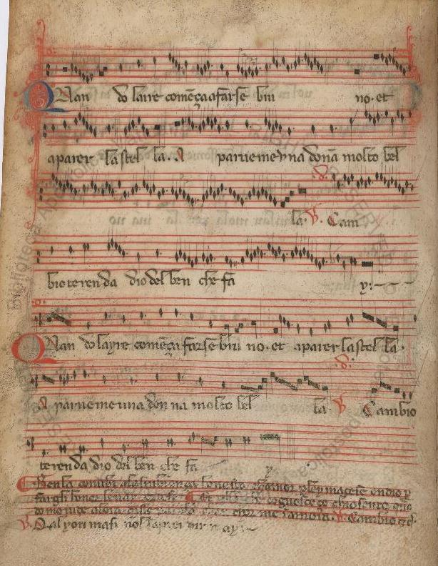 Rome, Biblioteca Apostolica Vaticana, Rossi 215